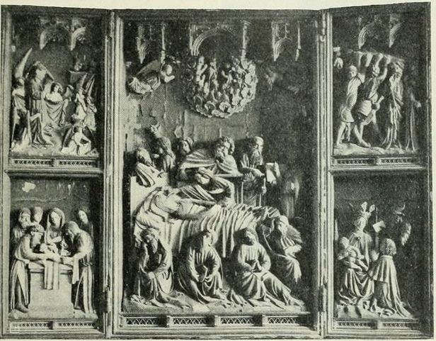 Kalannin (Uusikirkko T.l.) Pyhän Olavin kirkon alttarikaappi, sijoitettu Kansallismuseoon